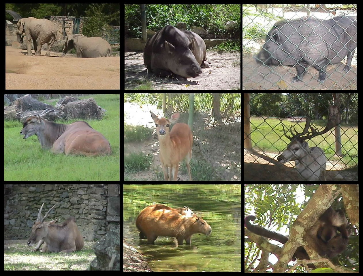 Mamiferos Zoologico de Caricuao Caracas - Venezuela